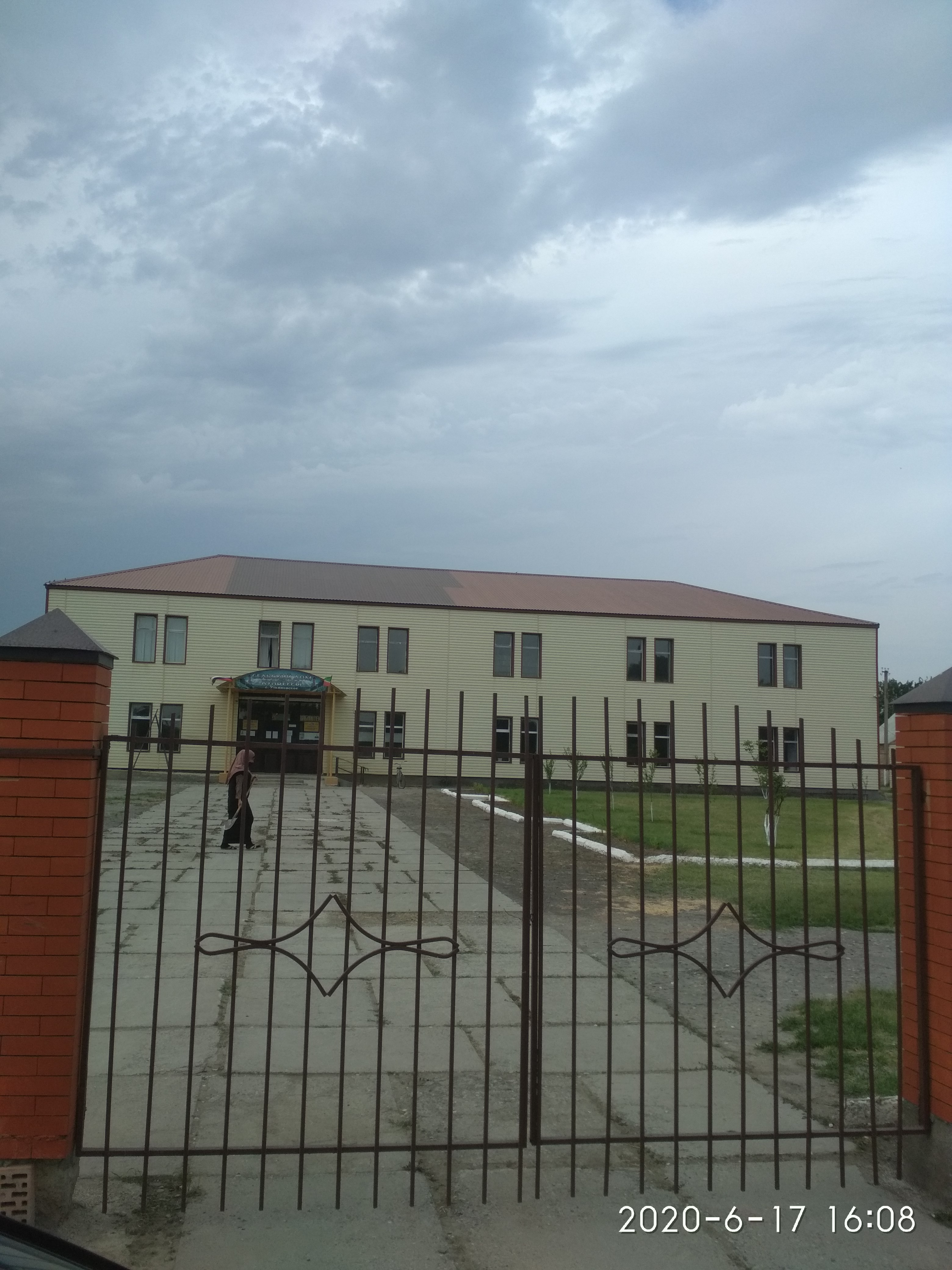 Нохчийн: Ульяновскера оьздангаллин цӀа